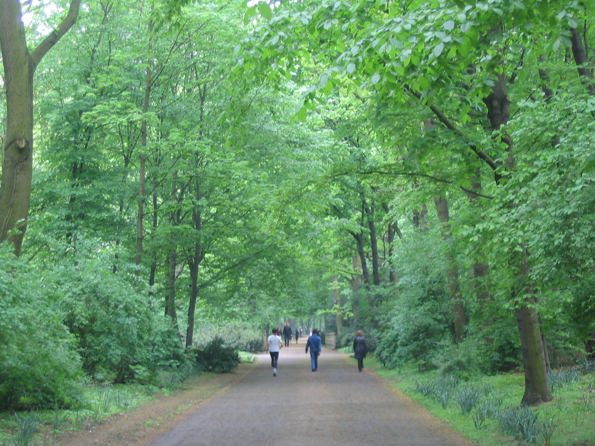 Het park Großer Tiergarten ligt in het centrum van Berlijn, in het district Mitte en stadsdeel Tiergarten. Eigen werk.